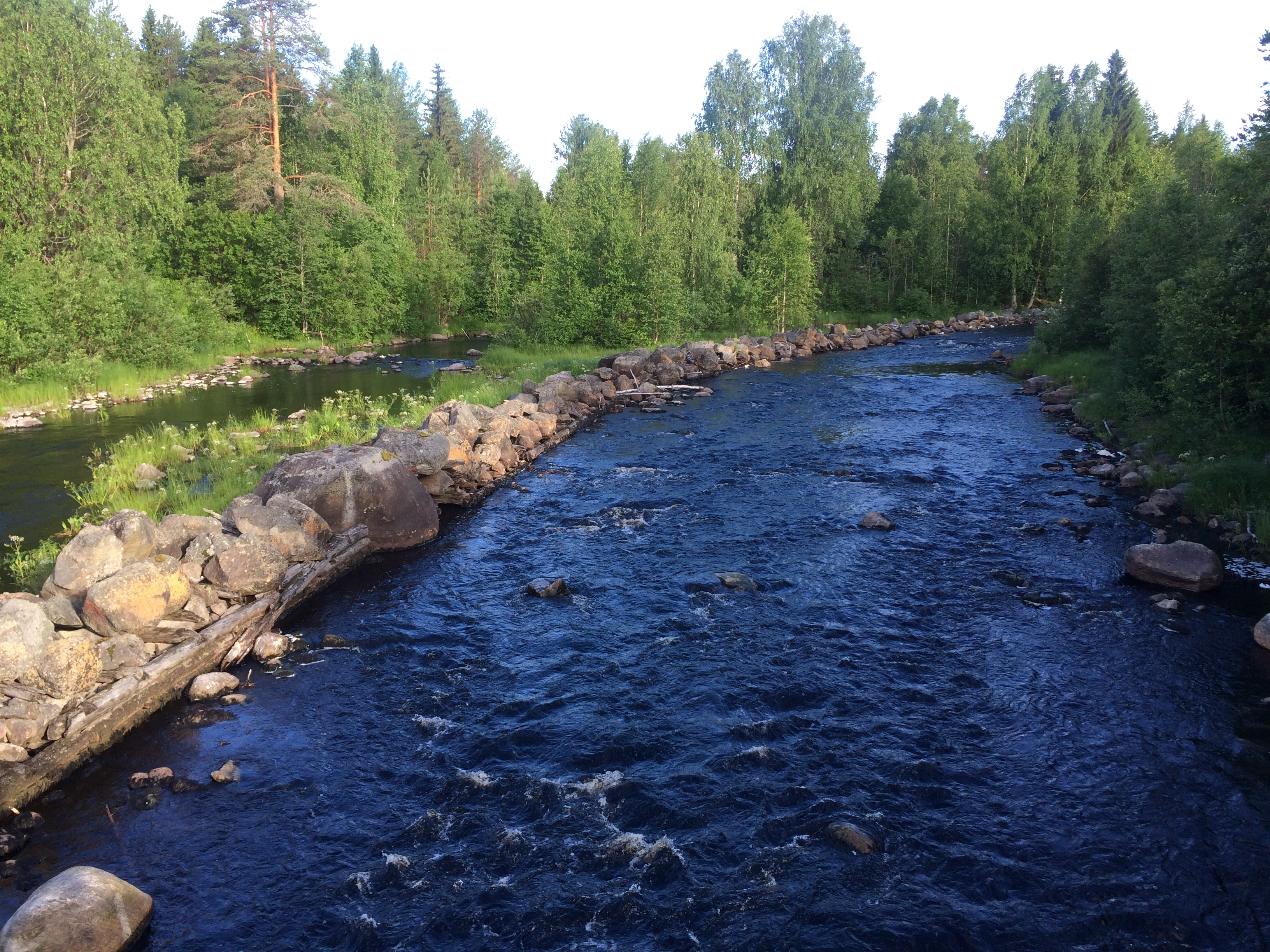 Айттойоки